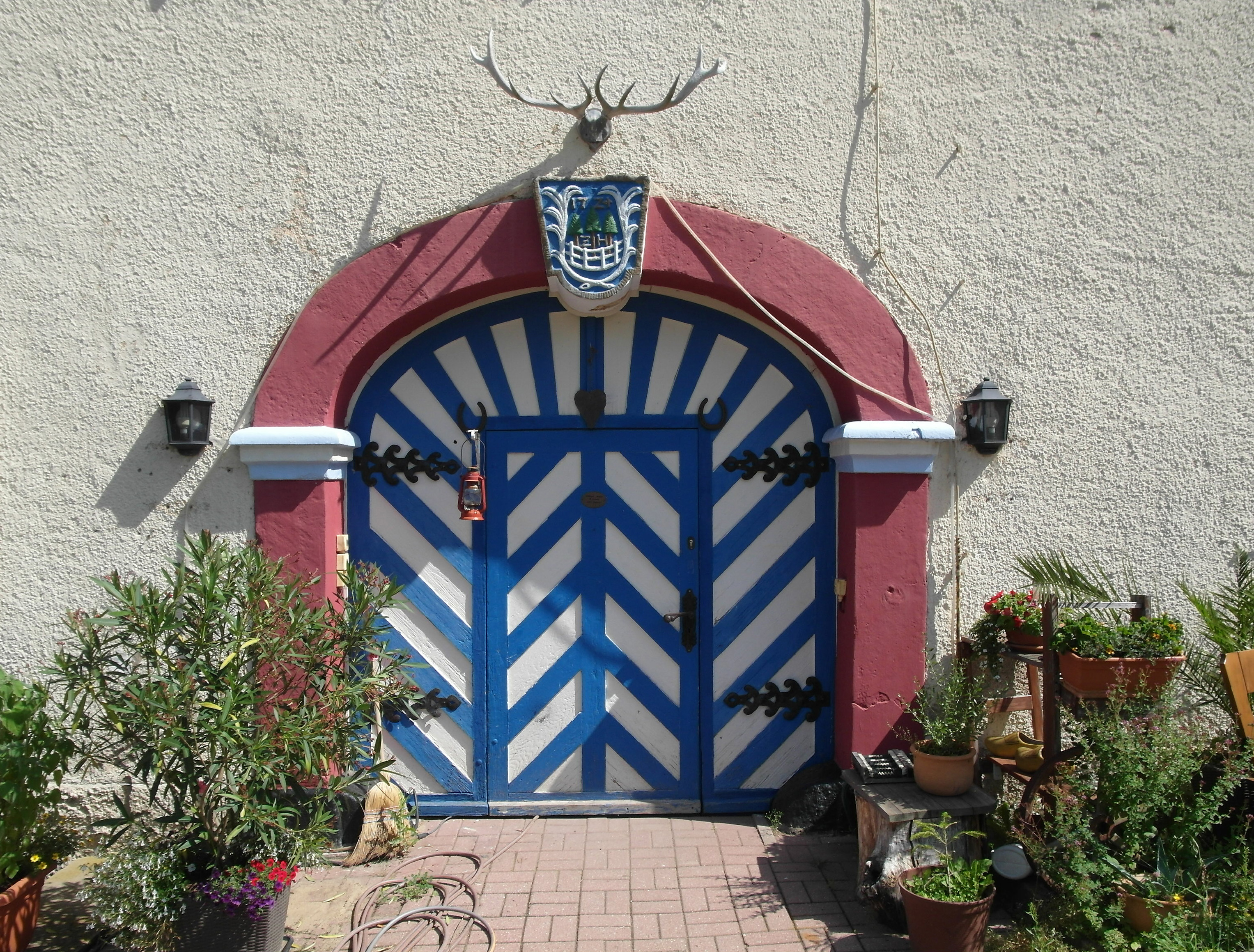 18.07.2016 09619 Mulda: Herrenhaus, Am Rittergut 1. Portal am1724 von Zacharias Hegewald errichteten Herrenhaus. Im Schlußstein die Jahreszahl und das Monogramm ZH. [SAM6959.JPG]20160718210DR.JPG(c)Blobelt